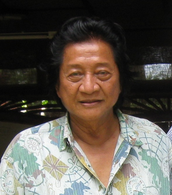 Индонезийский поэт, драматург, театральный деятель Рендра